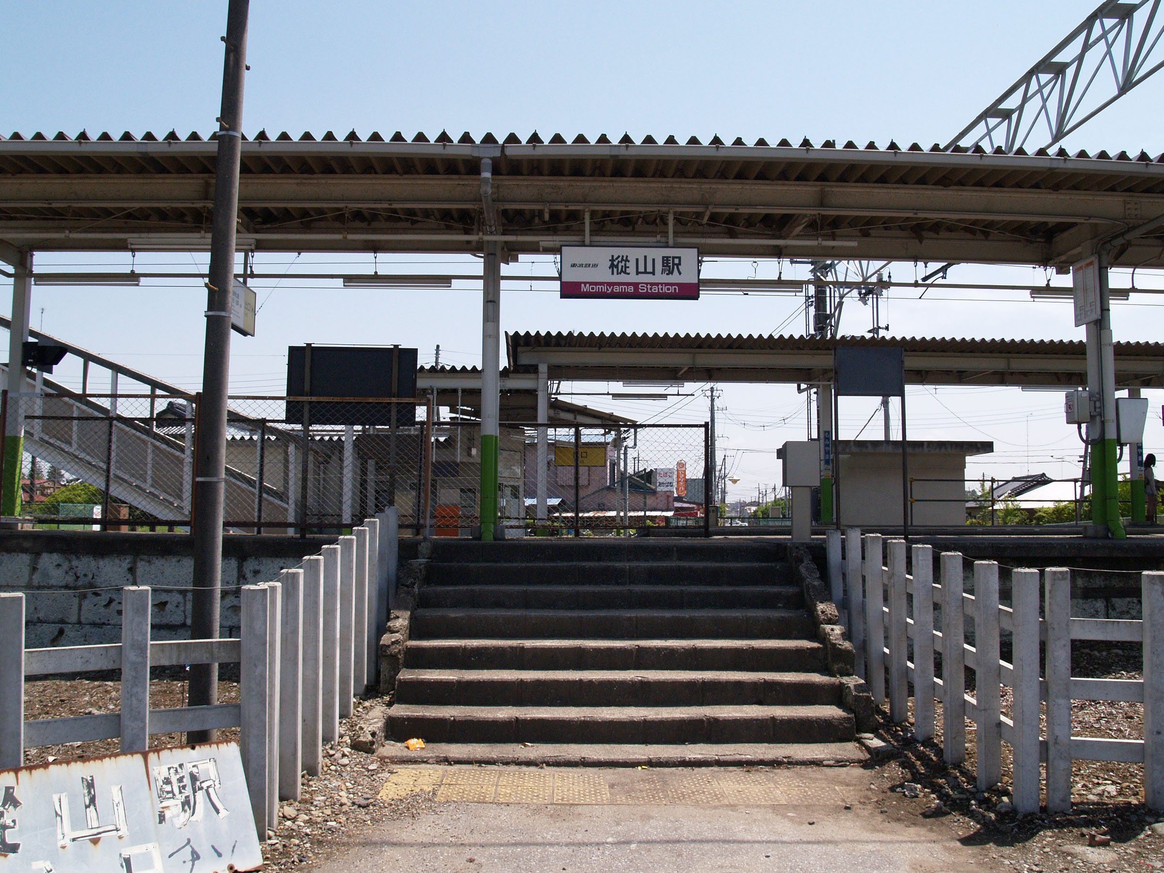 樅山駅2番線側出入口